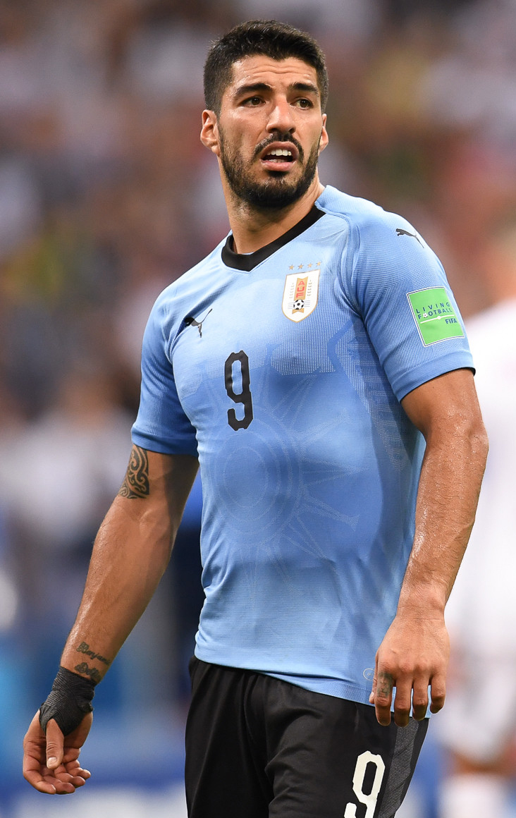 День, когда Роналду попрощался с ЧМ. Кавани и Суарес идут дальше